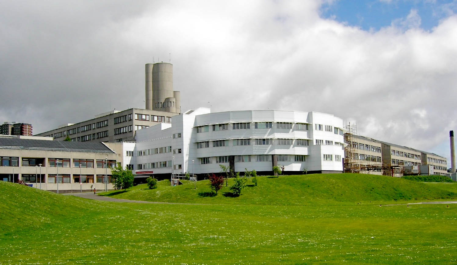 Ninewells Hospital